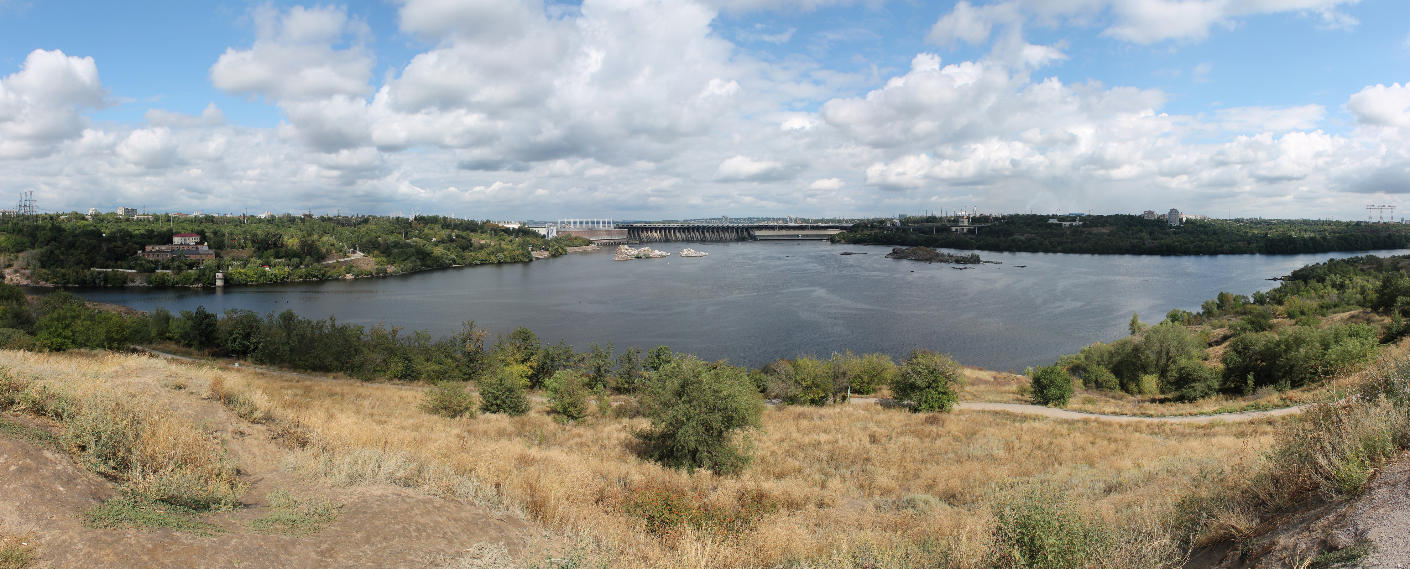 Вид на ДніпроГЕС з о.Хортиця, м.Запоріжжя